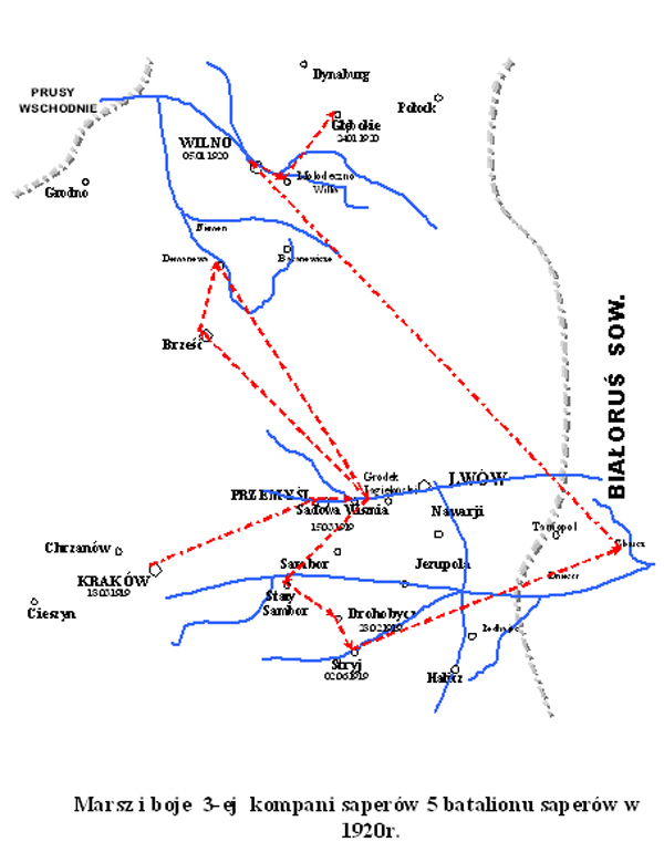 Boje i marsze 3 ksap z 5 Pułku Saperów w 1920r.